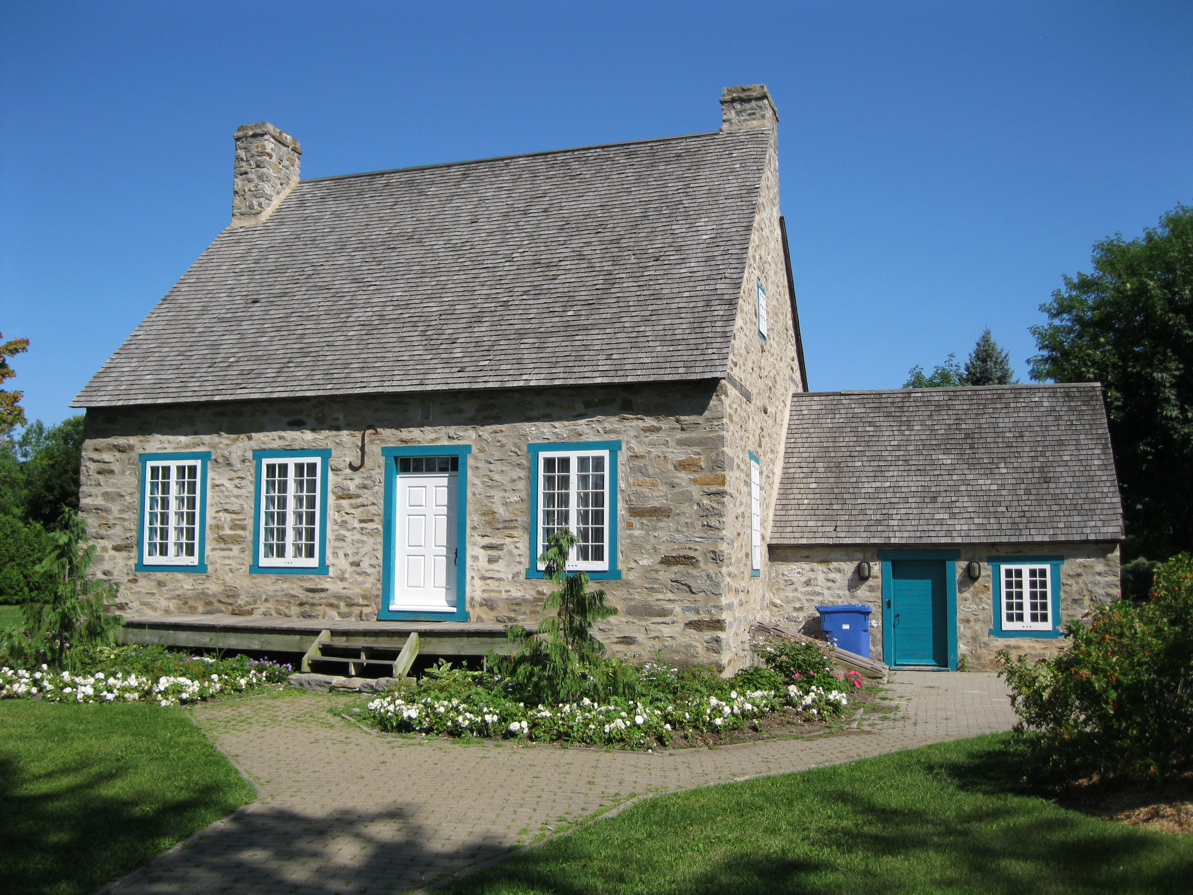 Maison Lanthier, 11, chemin Lantier, Kirkland, Québec